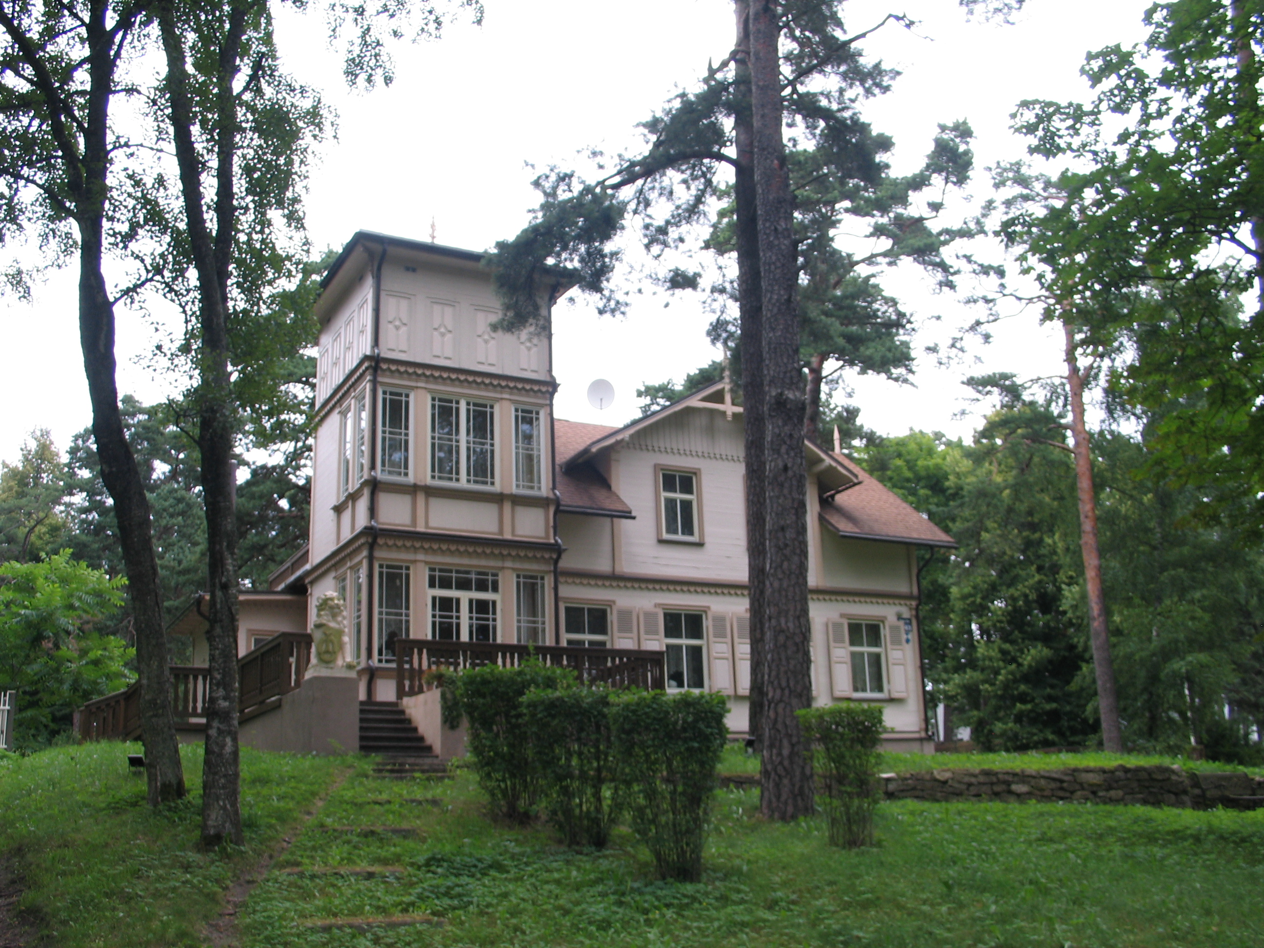 Деревянный дом на углу улиц Гайдас и Капу в Юрмале